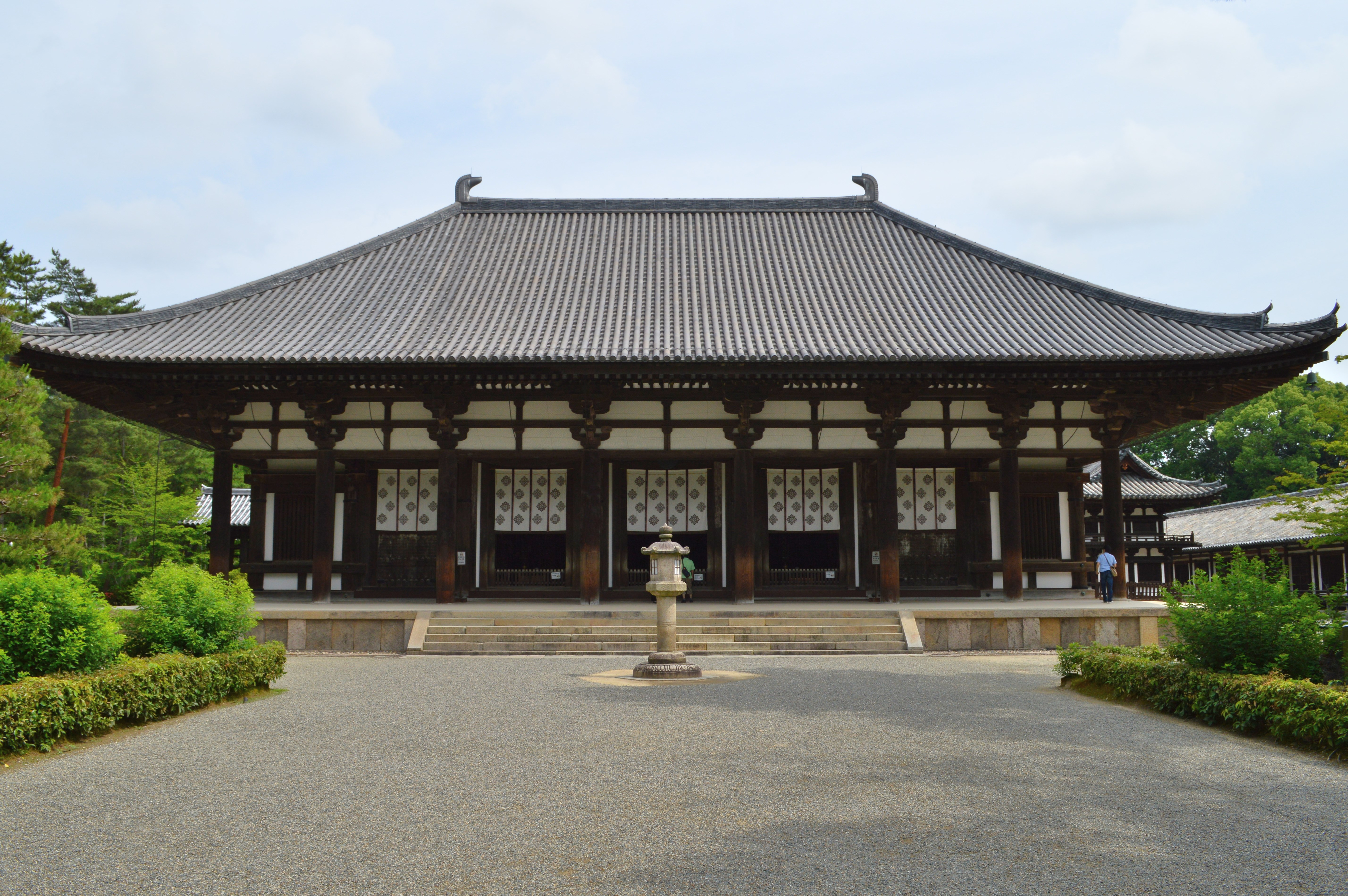 唐招提寺 金堂